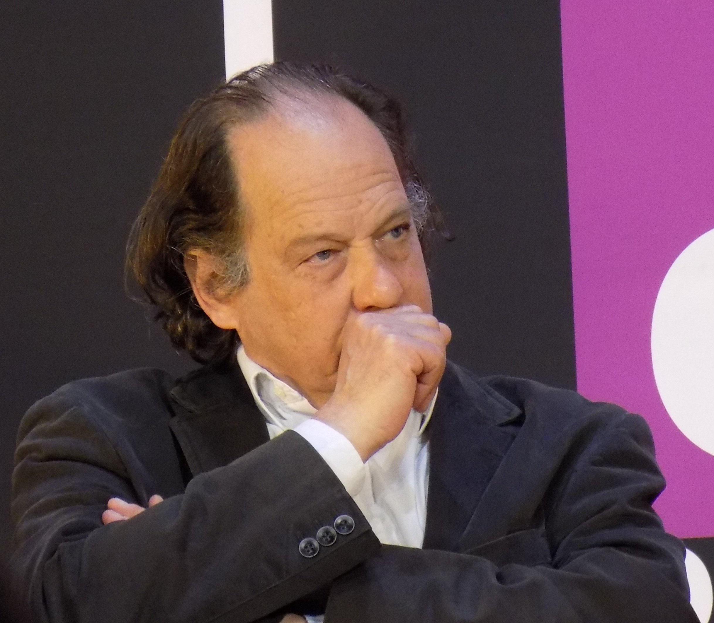 Jean-Claude Ameisen lors du forum « L’année vue par… les sciences » organisée par France Culture le 14 février 2015